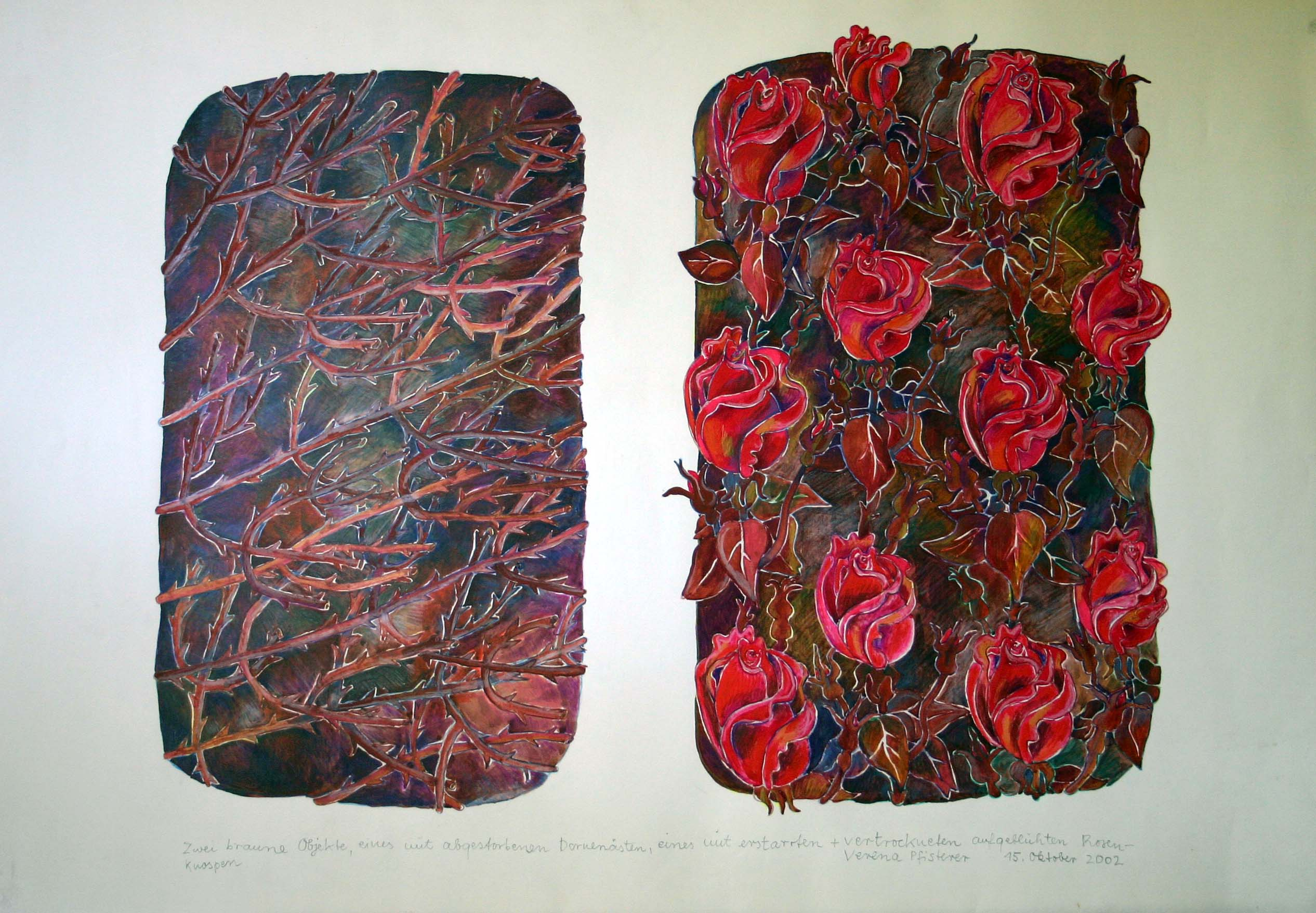 Zeichnung: Abgestorbene Dornenäste/erstarrte und vertrocknete aufgeblühte Rosenknospen, Verena Pfisterer, 2002